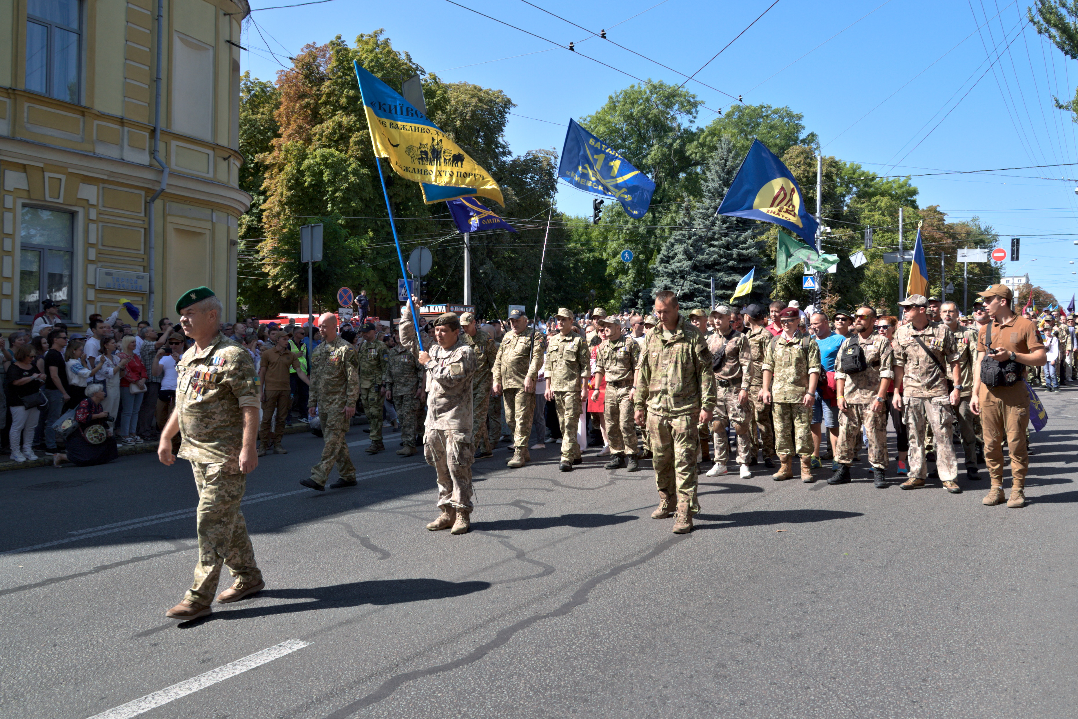 Ветерани війни на сході України з 11-го окремого мотопіхотного батальйону «Київська Русь»